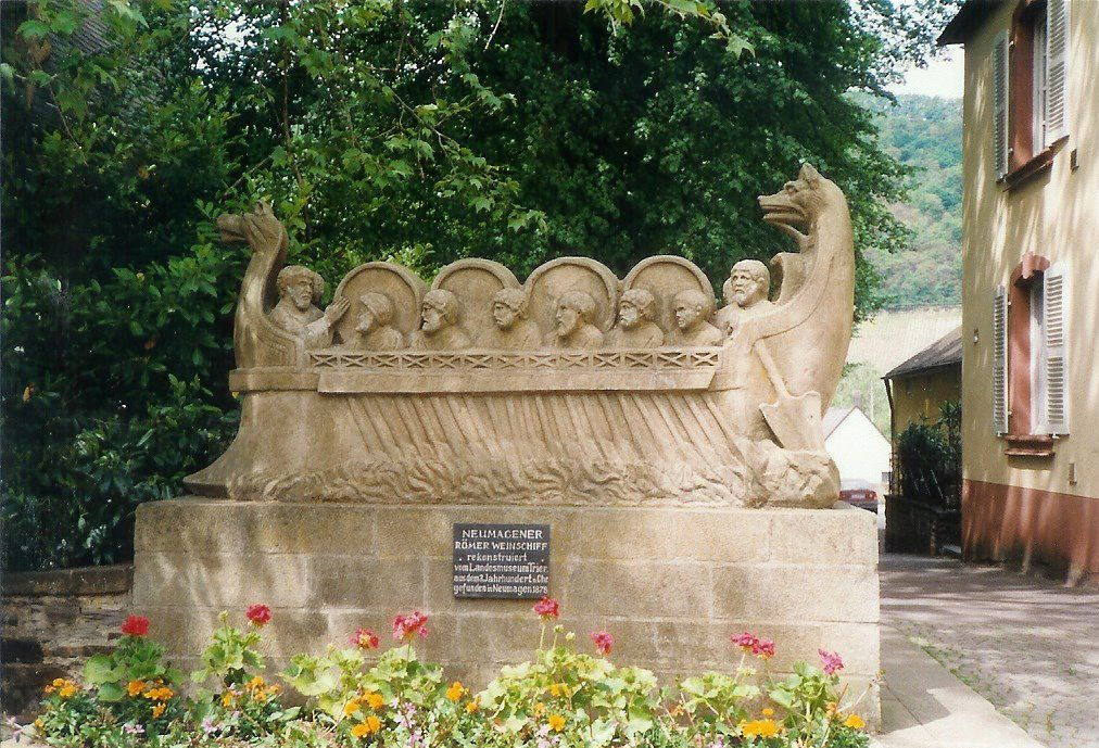 Neumagener Weinschiff